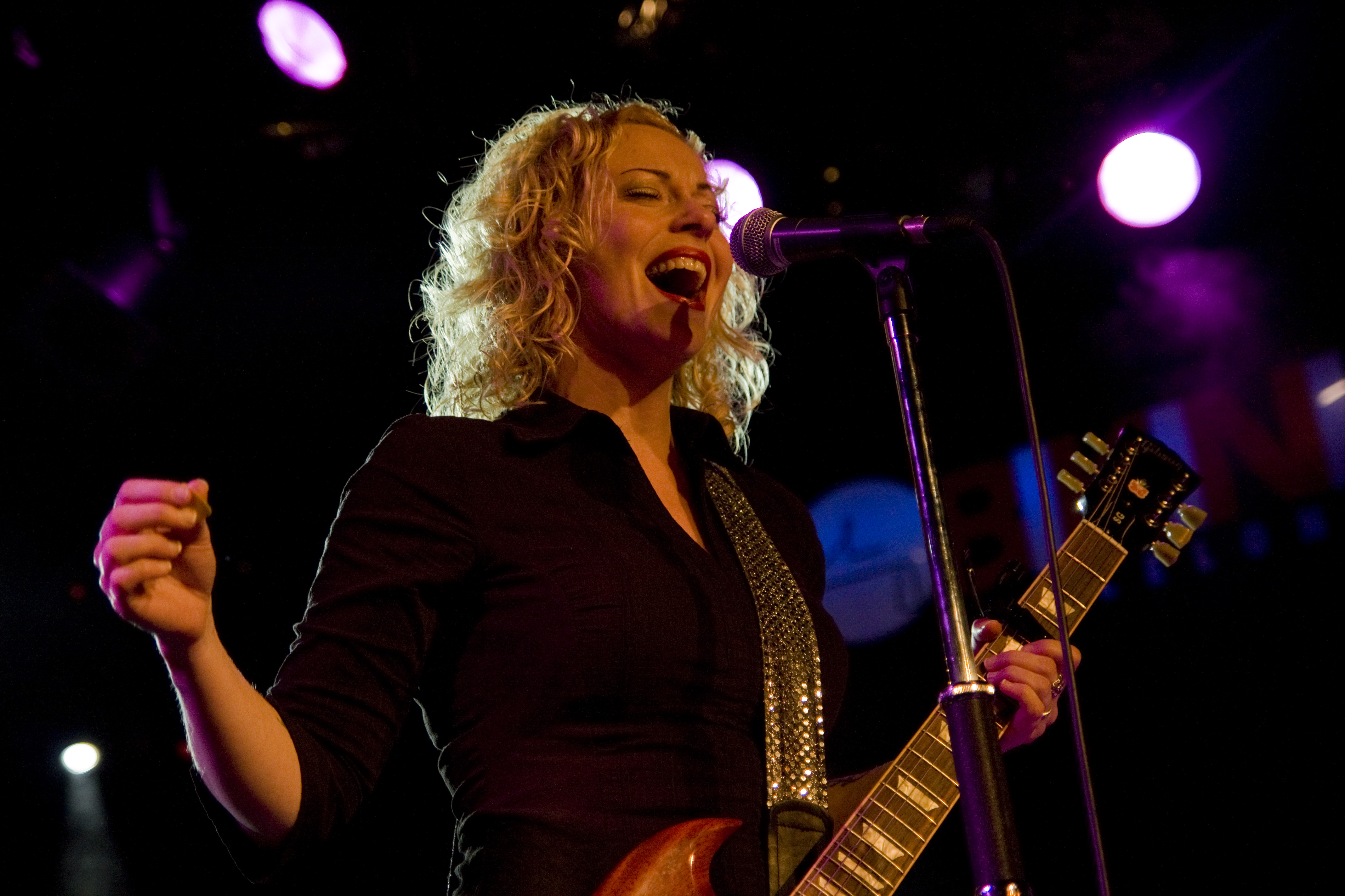 Concierto de Anneke van Giersbergen en Barcelona, Sala Bikini